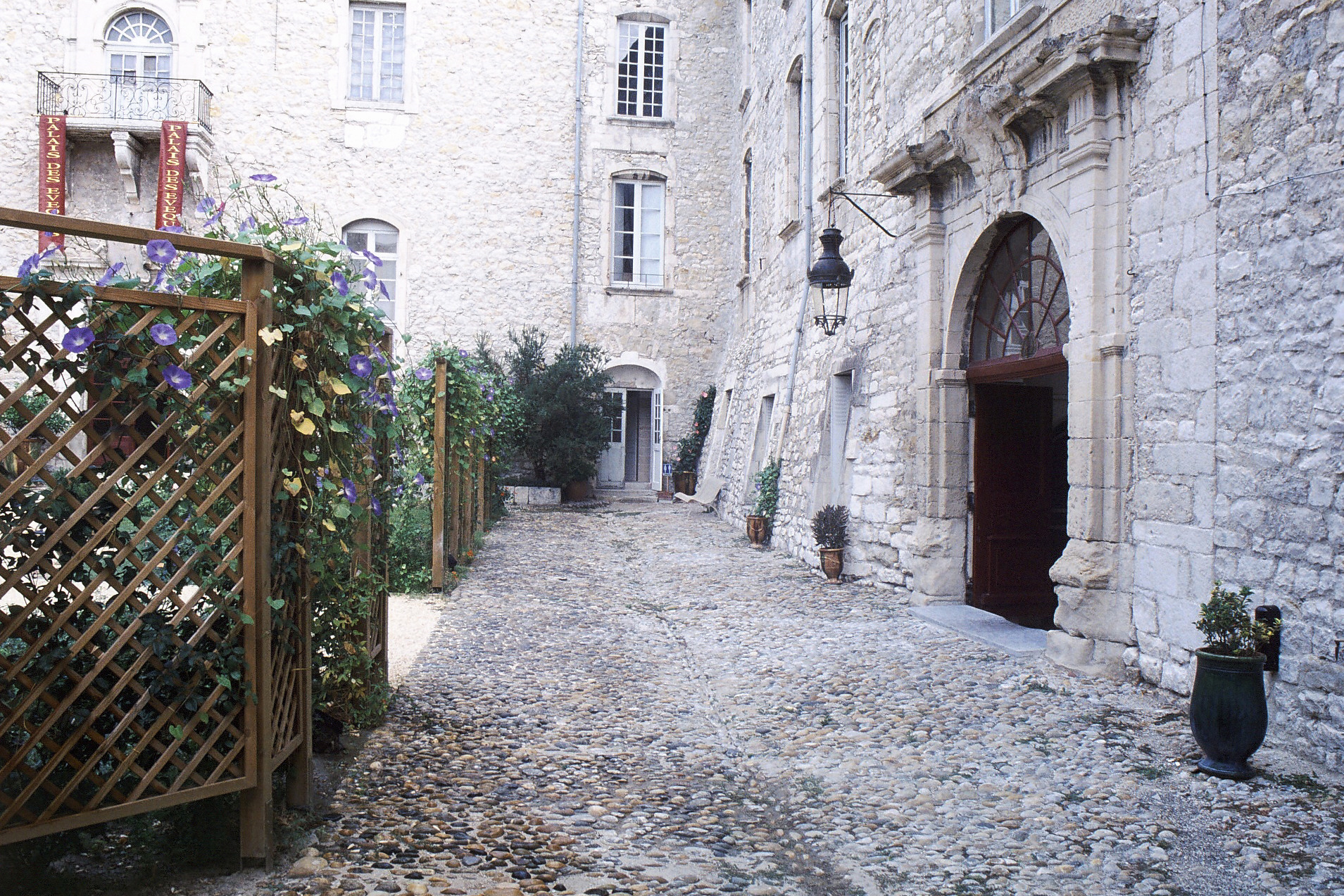 Entrée du musée à l'intérieur du Palais